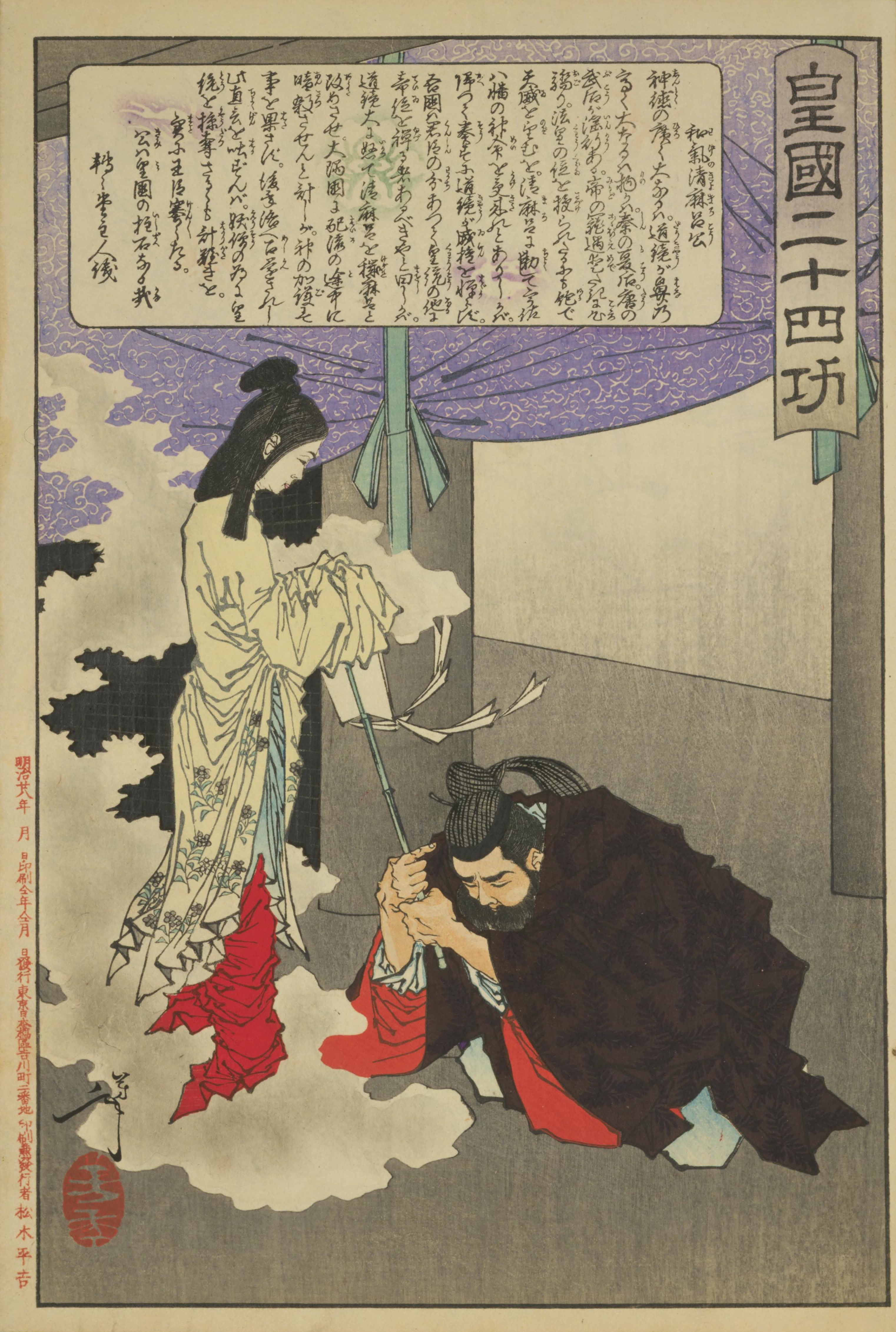 和気清麻呂（『皇国二十四功』より）